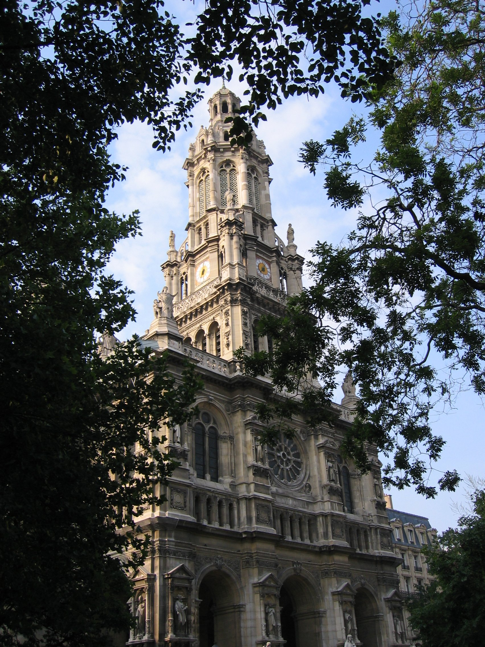 Égile de la Sainte-Trinité de Paris